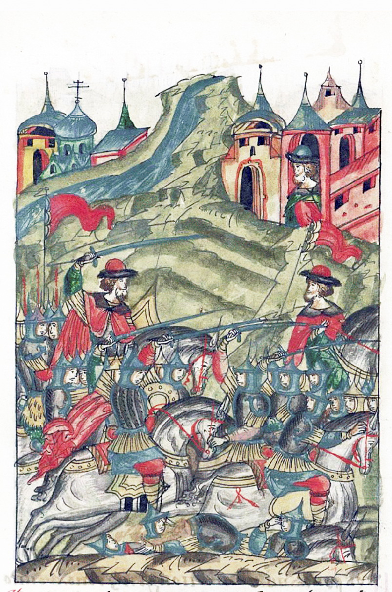 Миниатюра из летописного свода XVI века